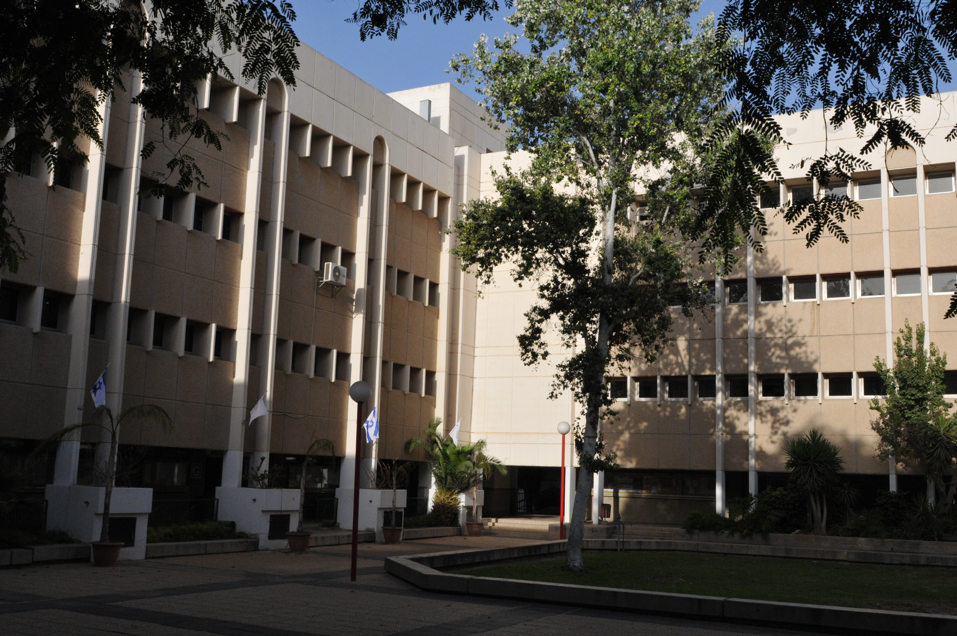 המכללה הטכנולוגית באר שבע